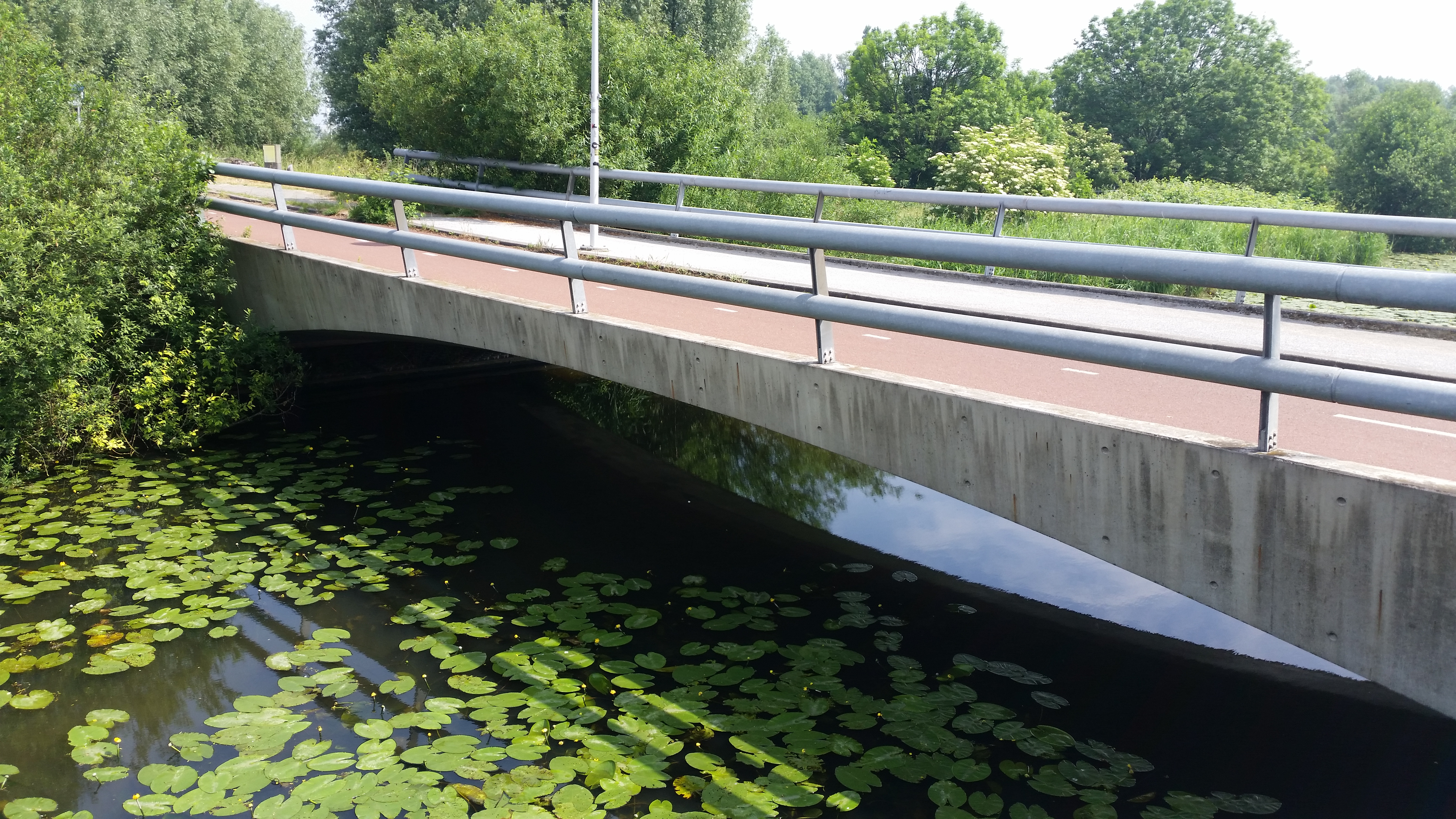 Brug 2392 ligt in de Australiëhavenweg en voert over de Haarlemmertrekvaart, Amsterdam Nieuw-West; is alleen voor voetgangers en fietsers